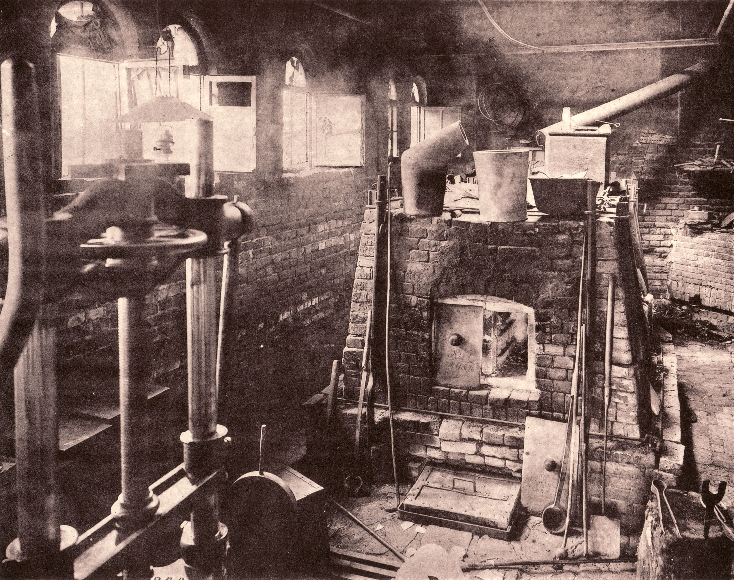 Deutsche Glasmosaik-Gesellschaft Puhl & Wagner − Rixdorf, Berlin: Glashütte mit Glasofen und Glaspresse